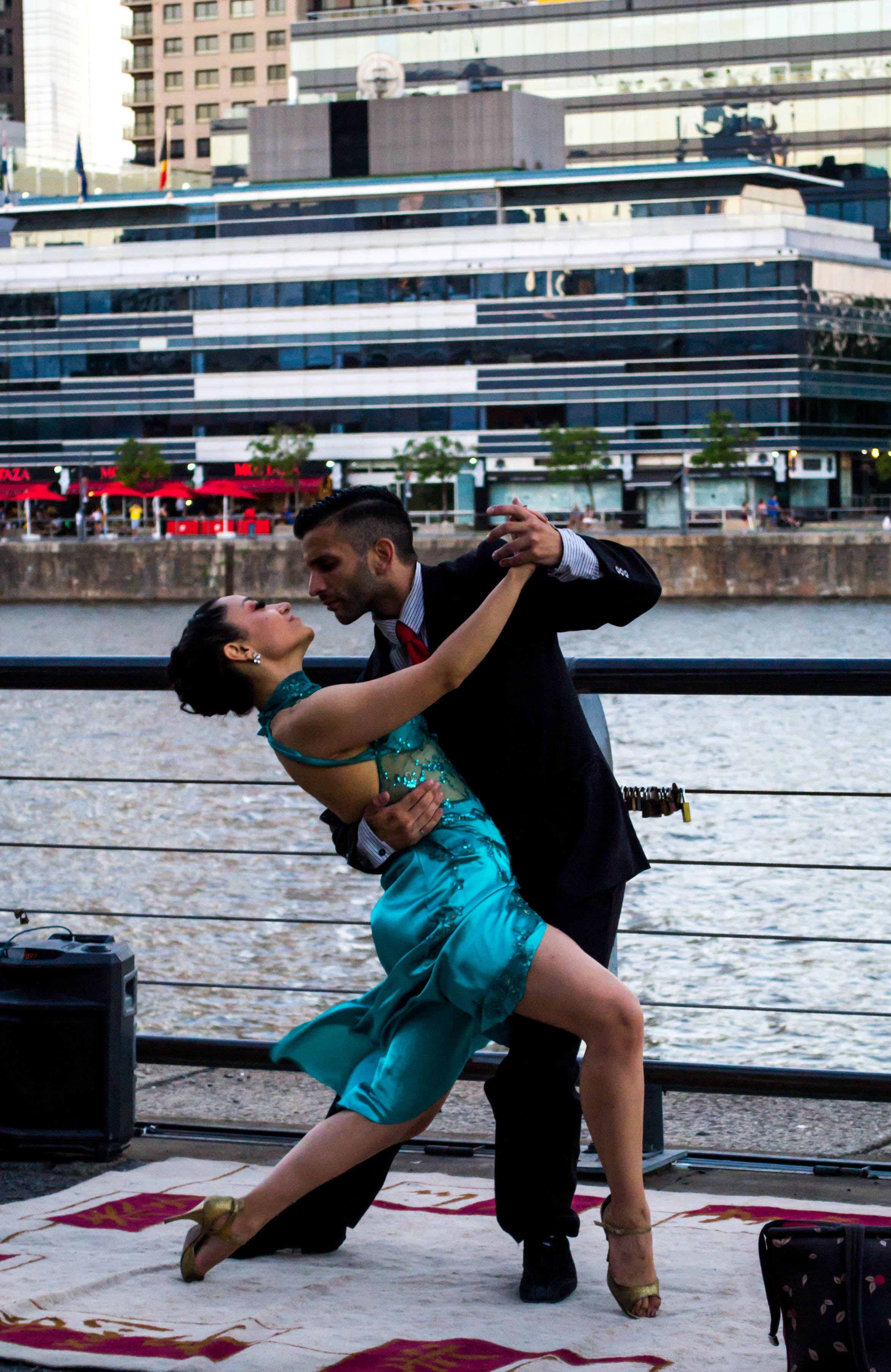 Bailarines en Puerto Madero, Buenos Aires